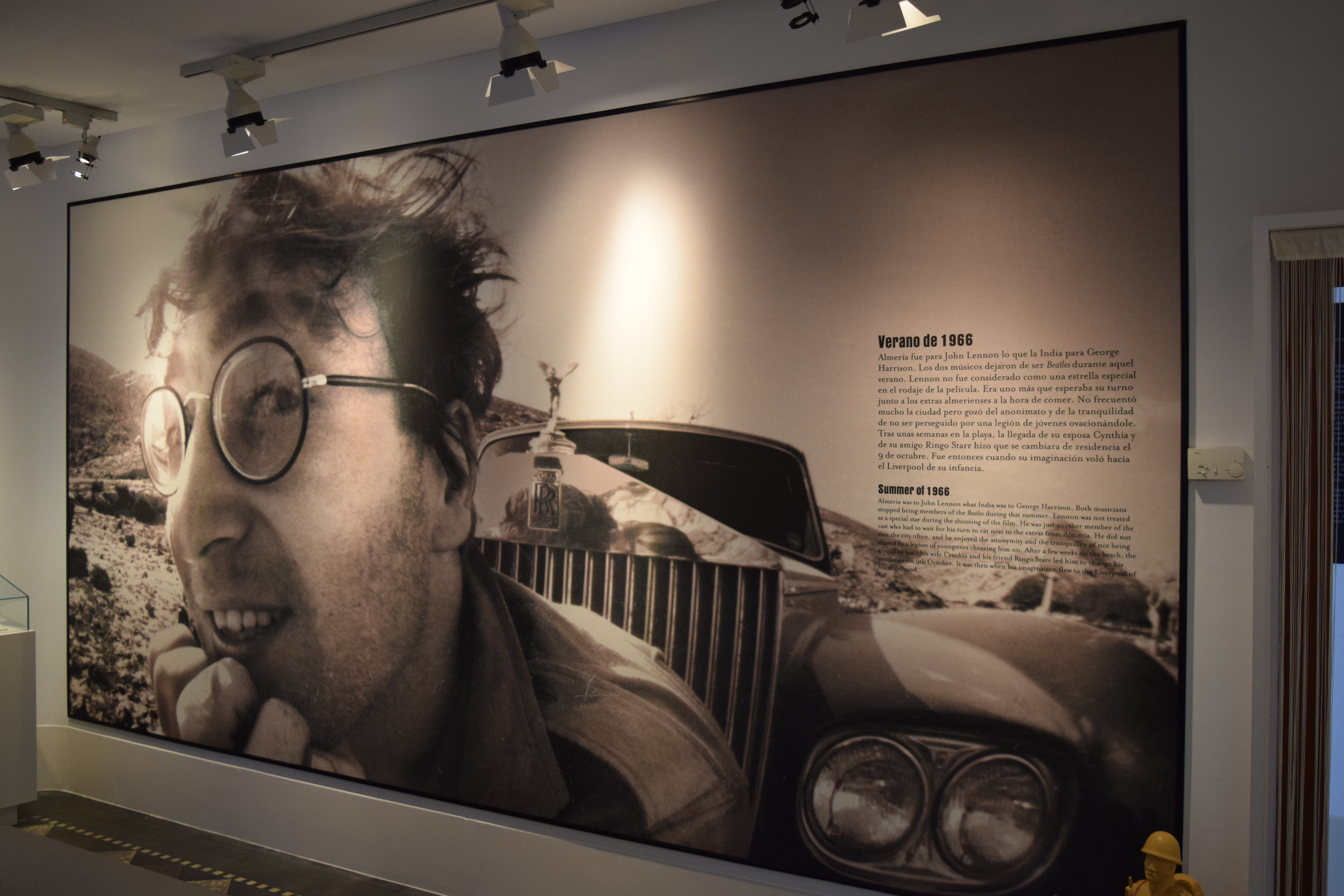 Sala Homenaje a John Lennon. Casa del Cine de Almería